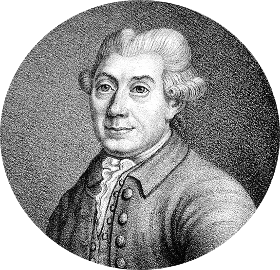 Carsten Niebuhr 17. marts 1733 - 26. april 1815, tysk/dansk opdagelsesrejsende